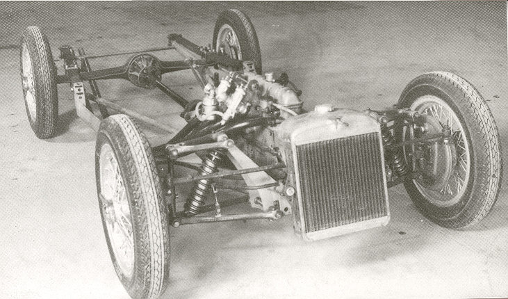 Bandini 750 sport siluro tratta da Libro: Bandini (storia della vita e automobili di Ilario Bandini)